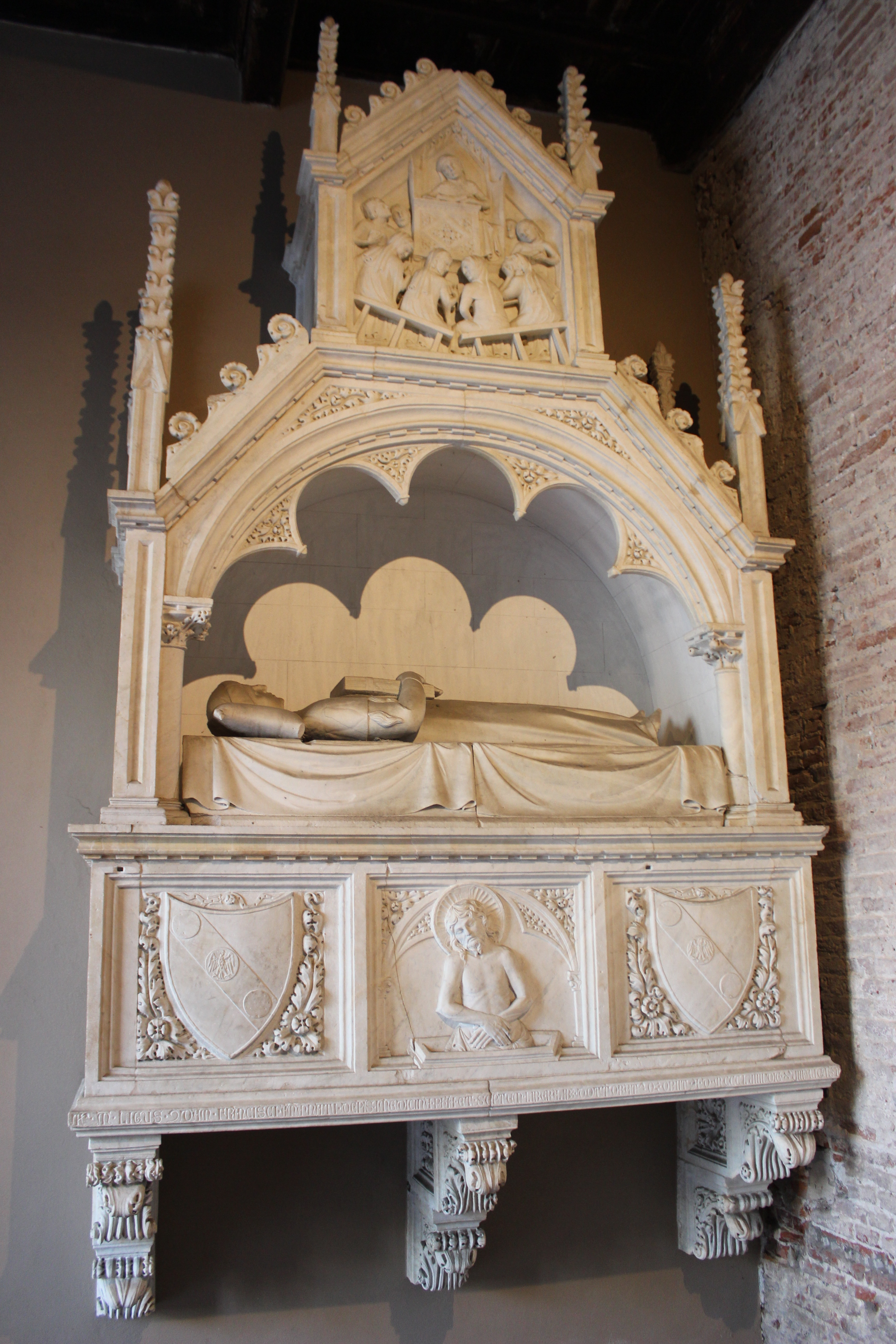 Pisa, Camposanto. Tumba de Ligo Ammannati